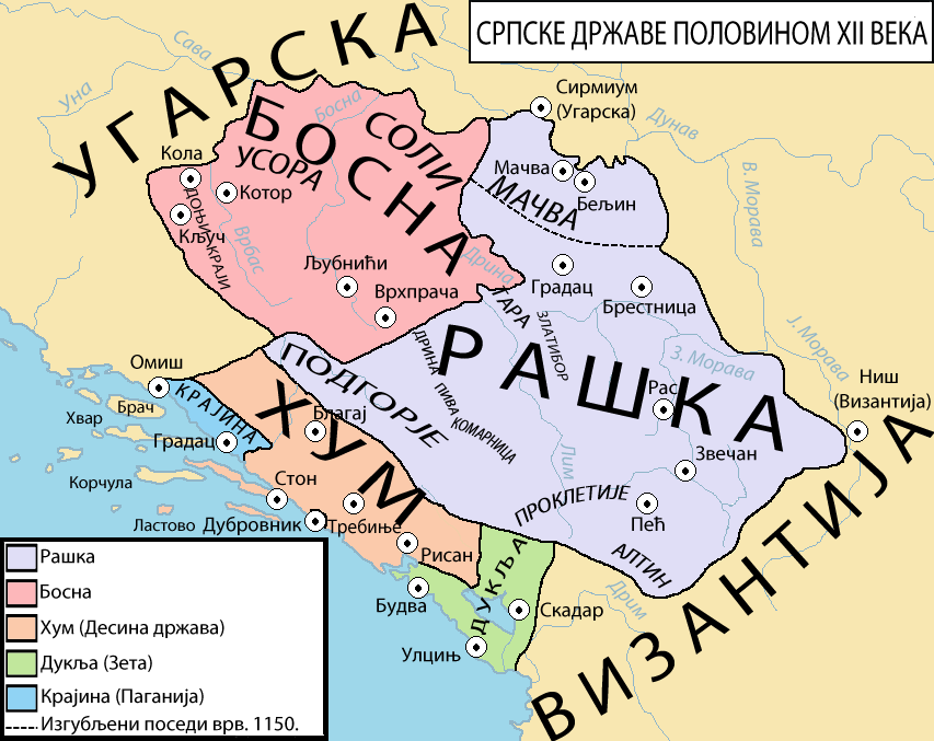 Српске државе половином 12. века.